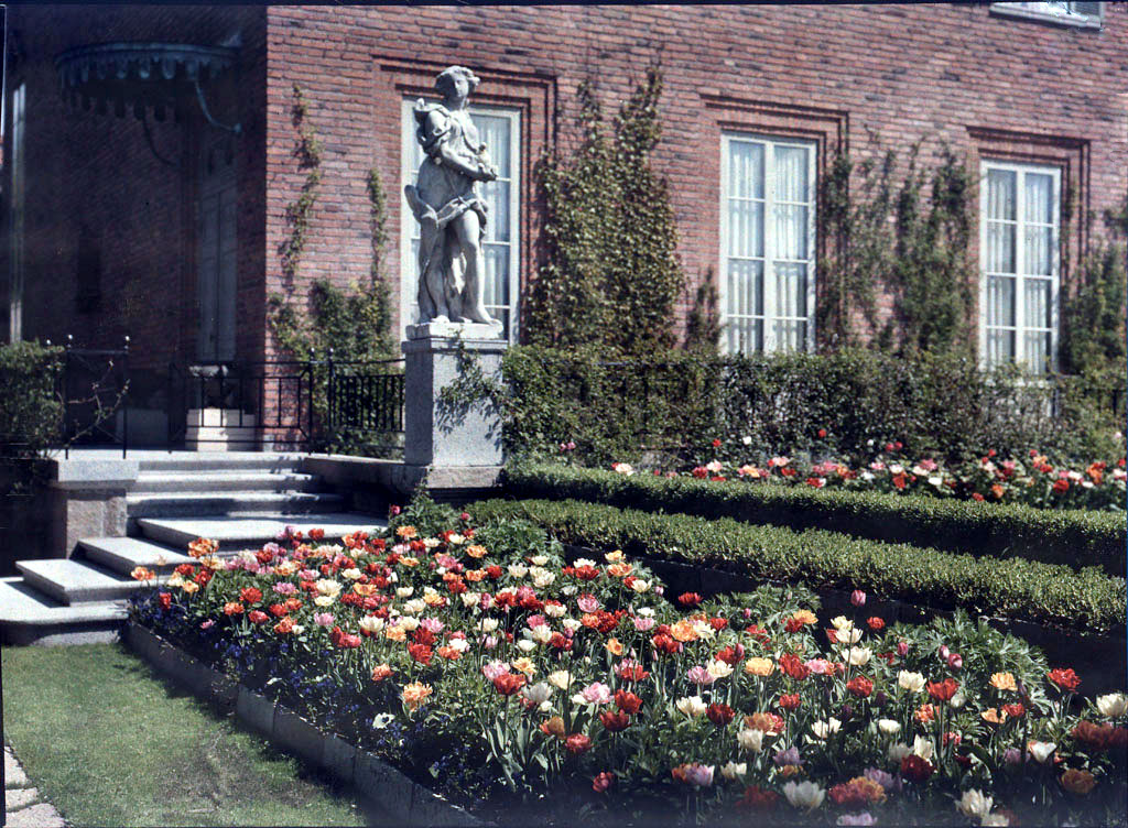 Villa Bonnier, Diplomatstaden, Stockholm, omkring 1930.